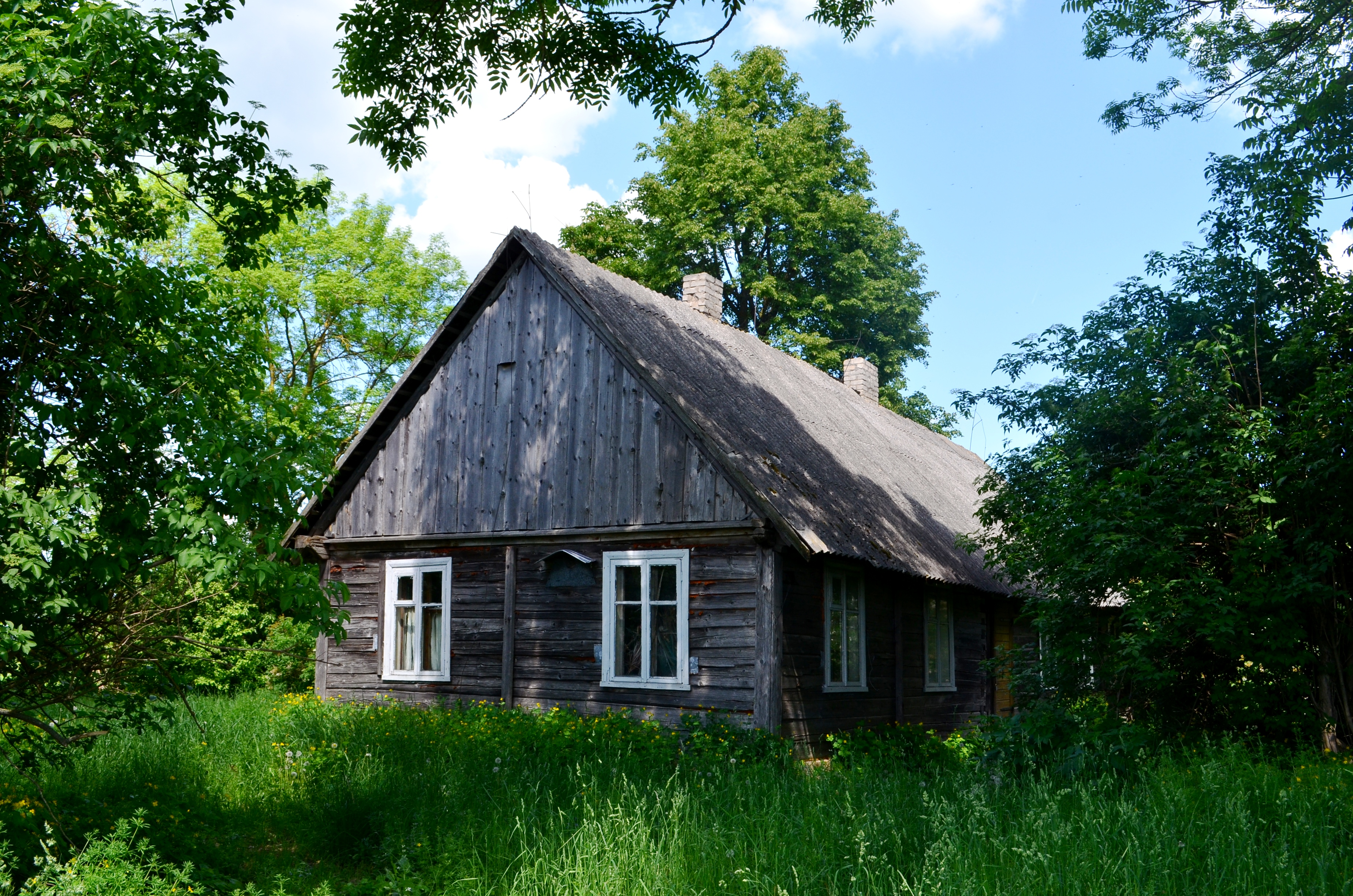 Jolitos Skablauskaitės sodyba, Kuisiai, Joniškio raj.